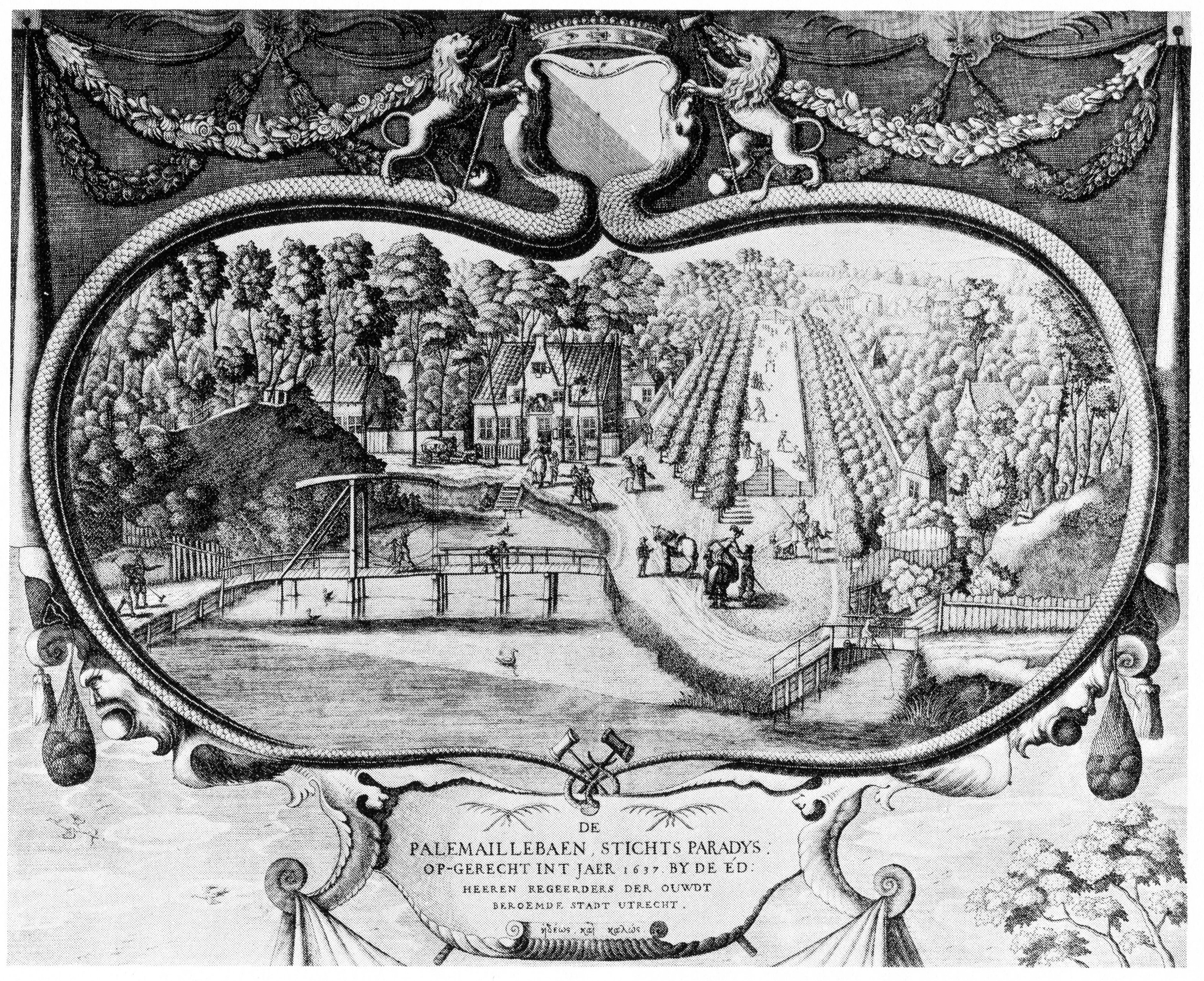 De Maliebaan in Utrecht, lichtdruk Goedeljee naar kopergravure van Winter